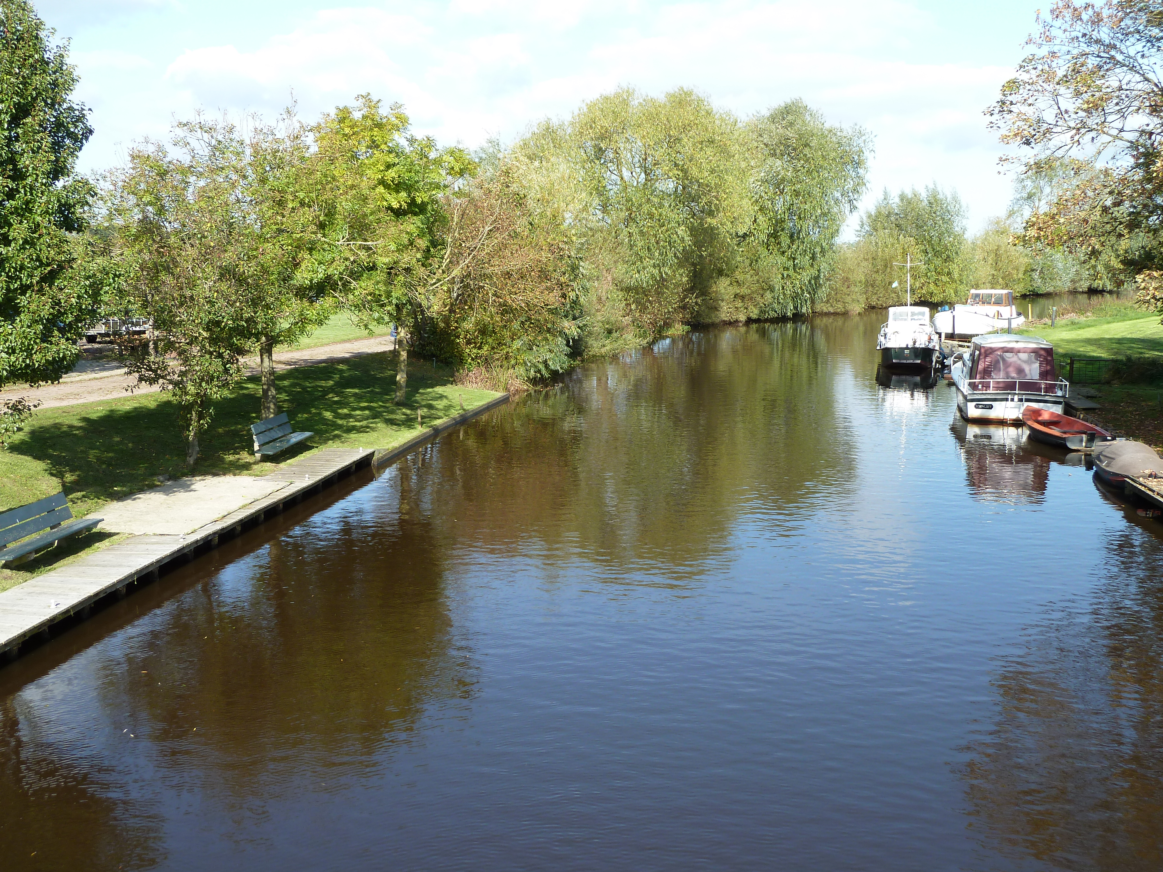 Lauwers bij Visvliet, gezien vanaf de Gerkesbrug naar het noorden.